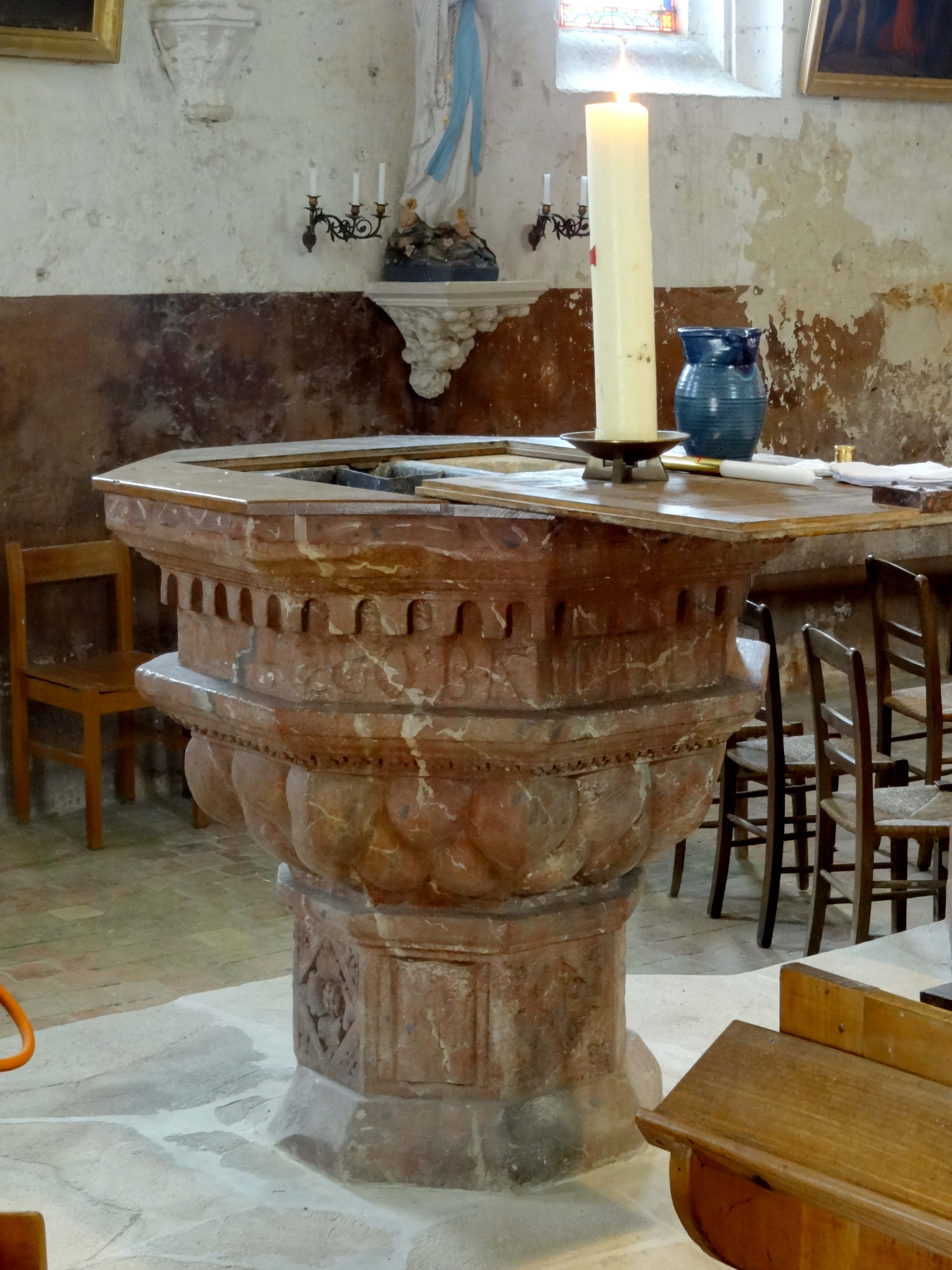 Mobilier de l'église - voir titre.